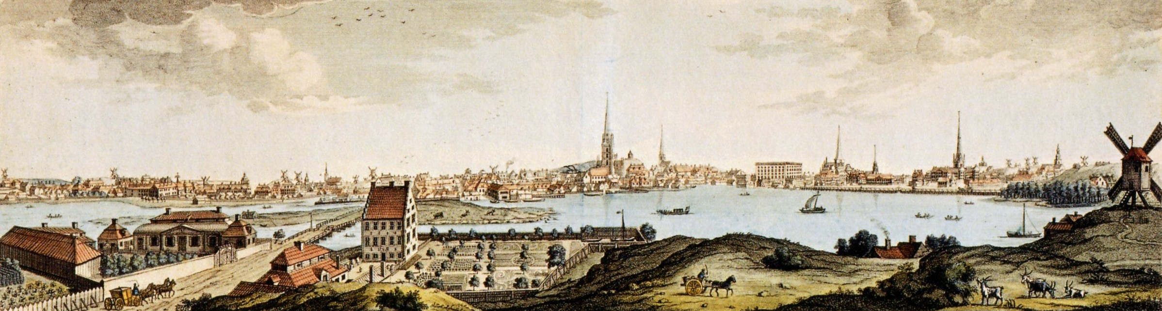 Panorama över Stockholm från Kungsholmen